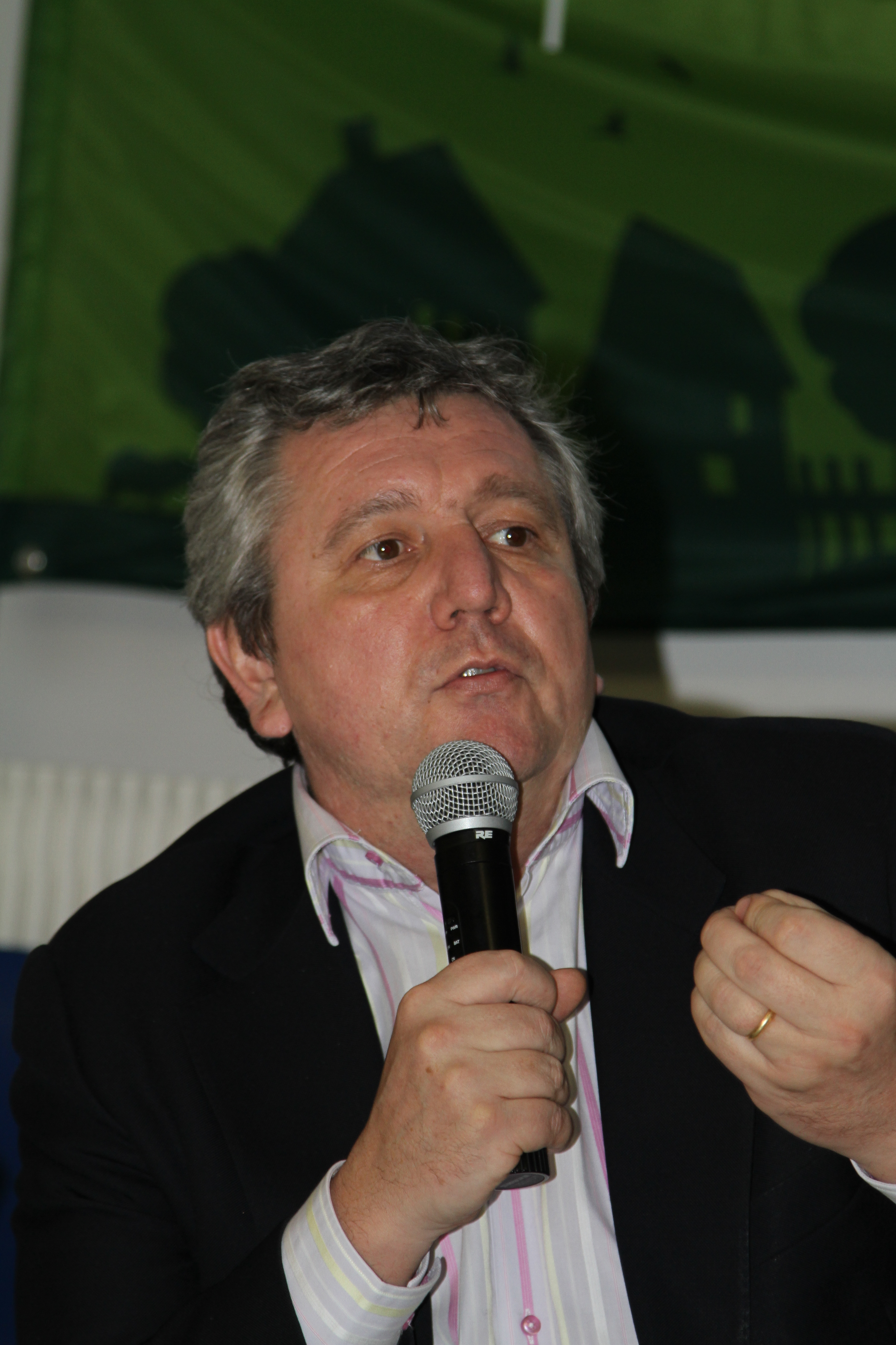 Guy Hascouët lors d'un meeting Europe Ecologie à Brest